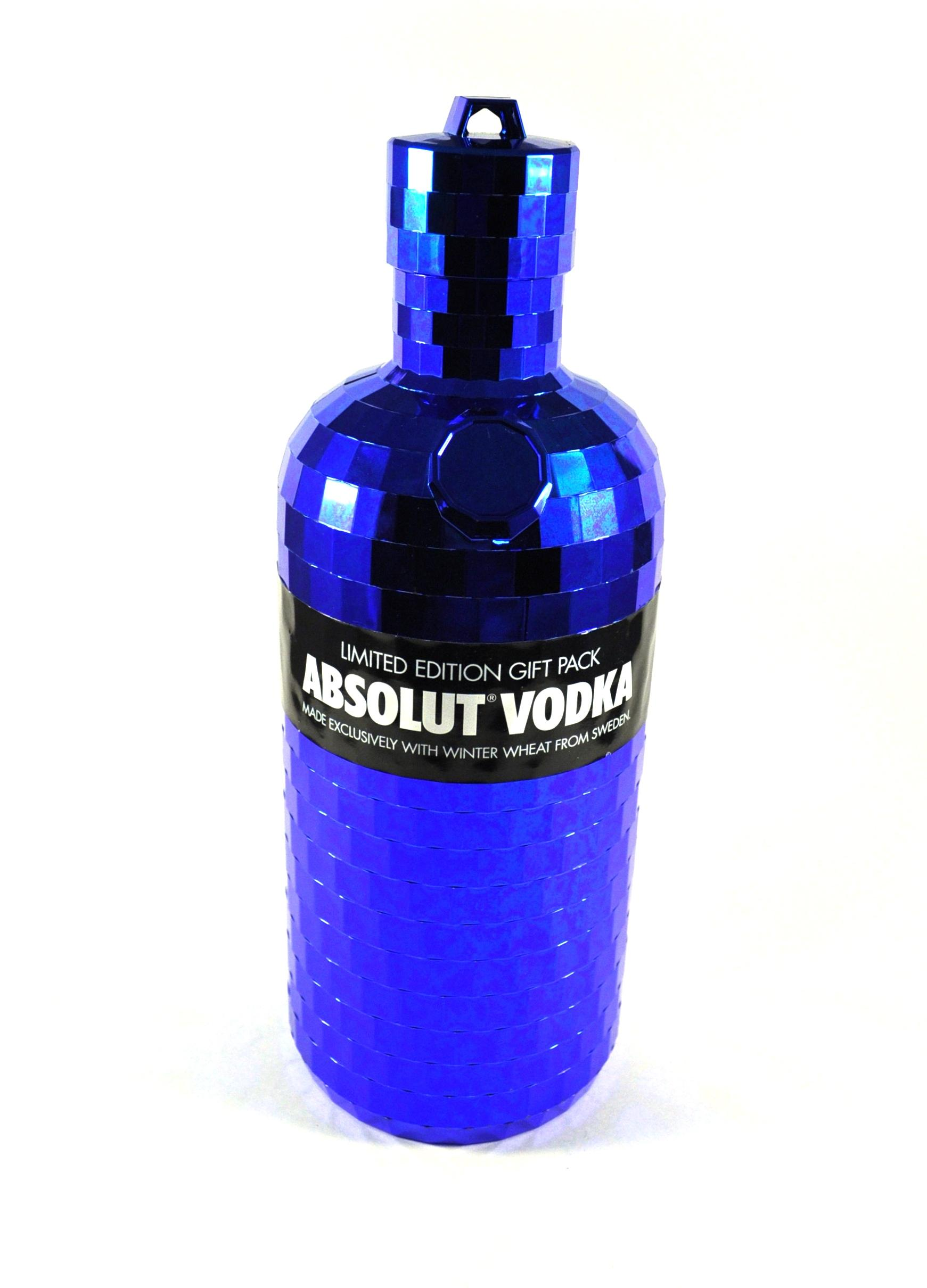 Absolut Vodka Limited Edition Gift Pack